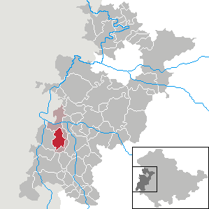 Völkershausen in Thuringia - Wartburgkreis